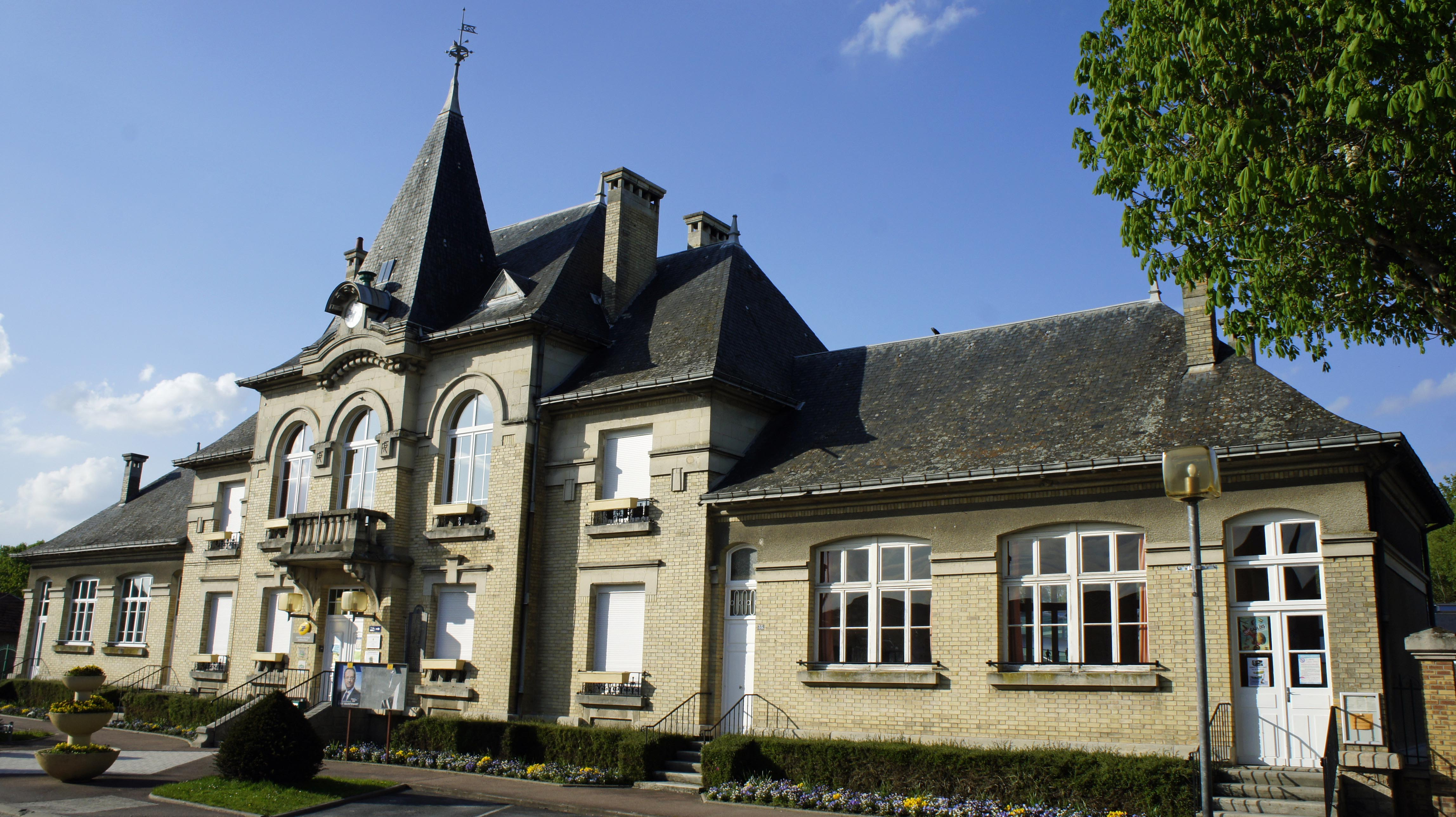 Mairie à Loivre.